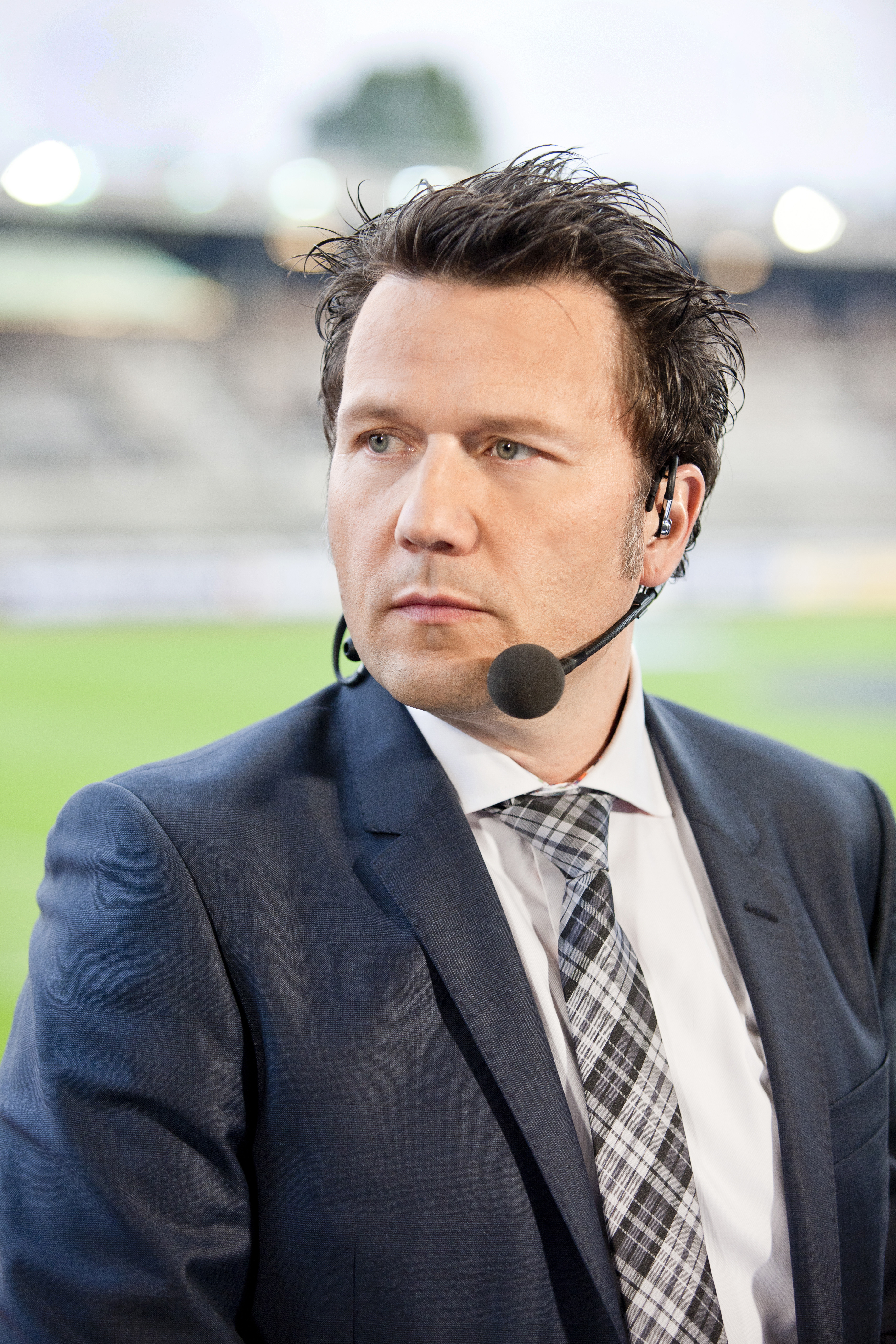 Expertkommentatorn och f.d. fotbollsspelaren Pelle Blohm.